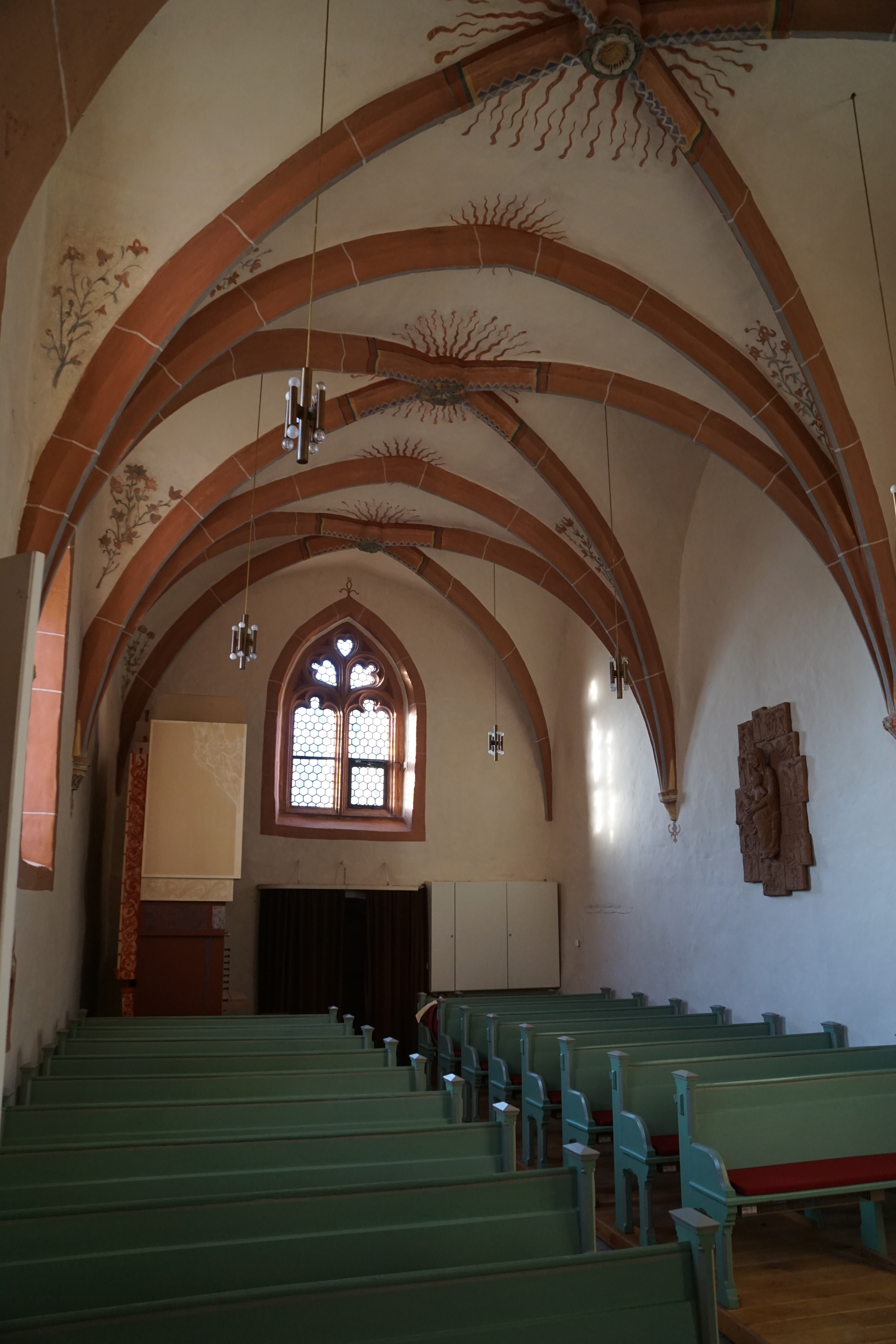 Siehe Bild und Dateiname